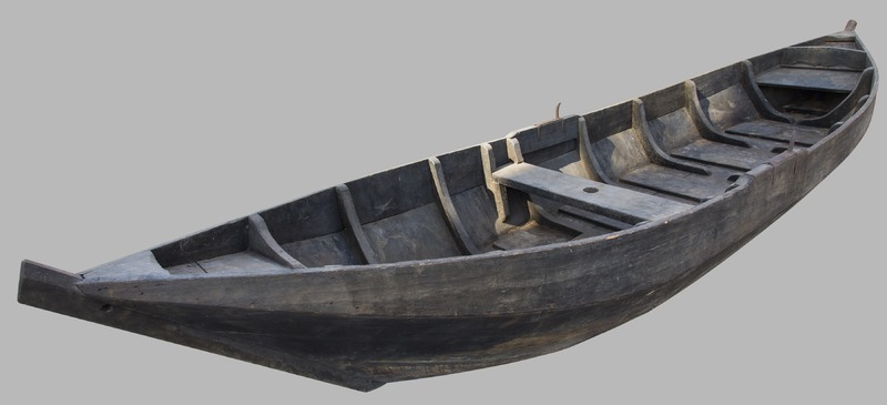 vloedpunter